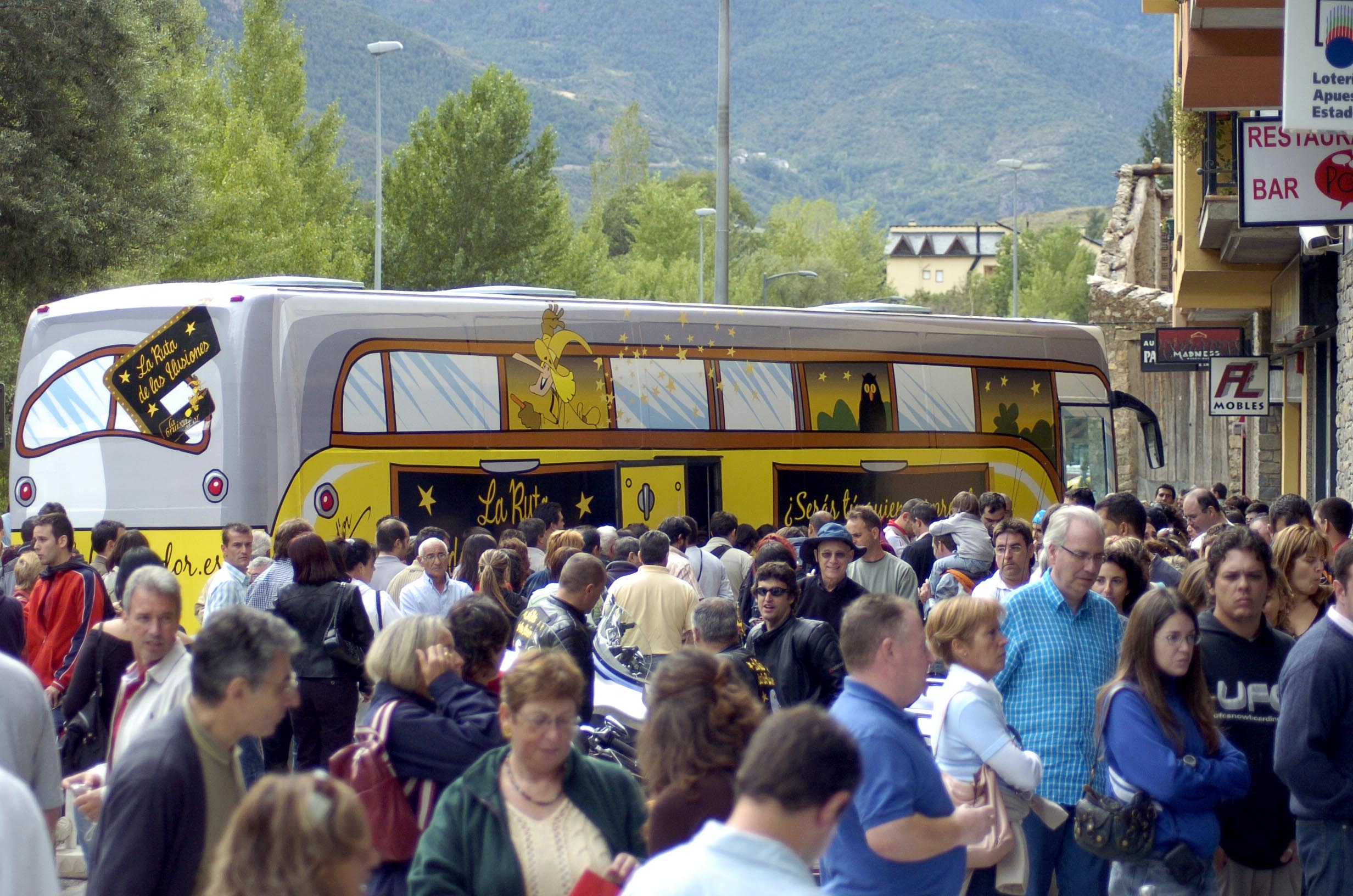 Cola de lotería